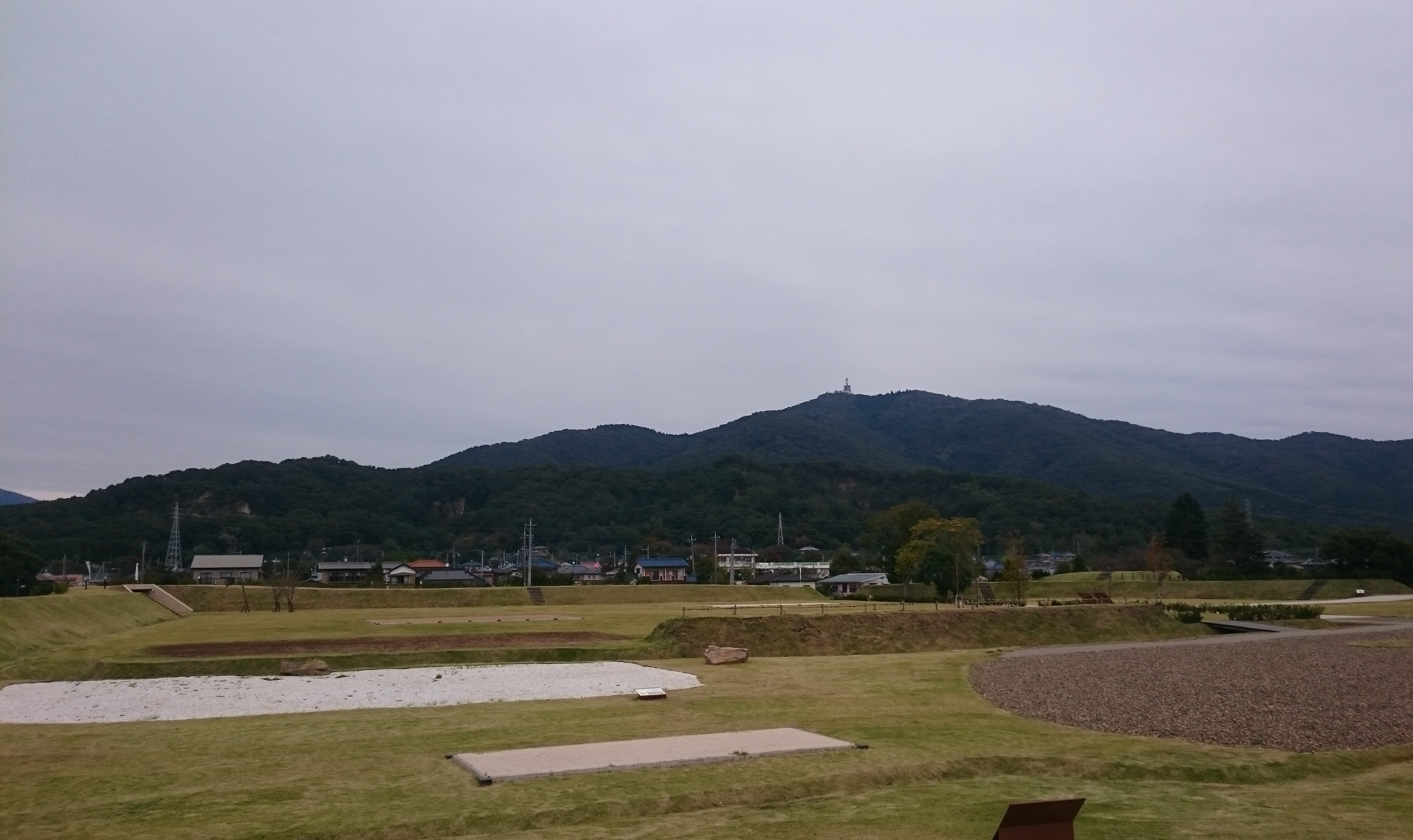 茨城県つくば市小田・小田城跡歴史広場から宝篋山を望む